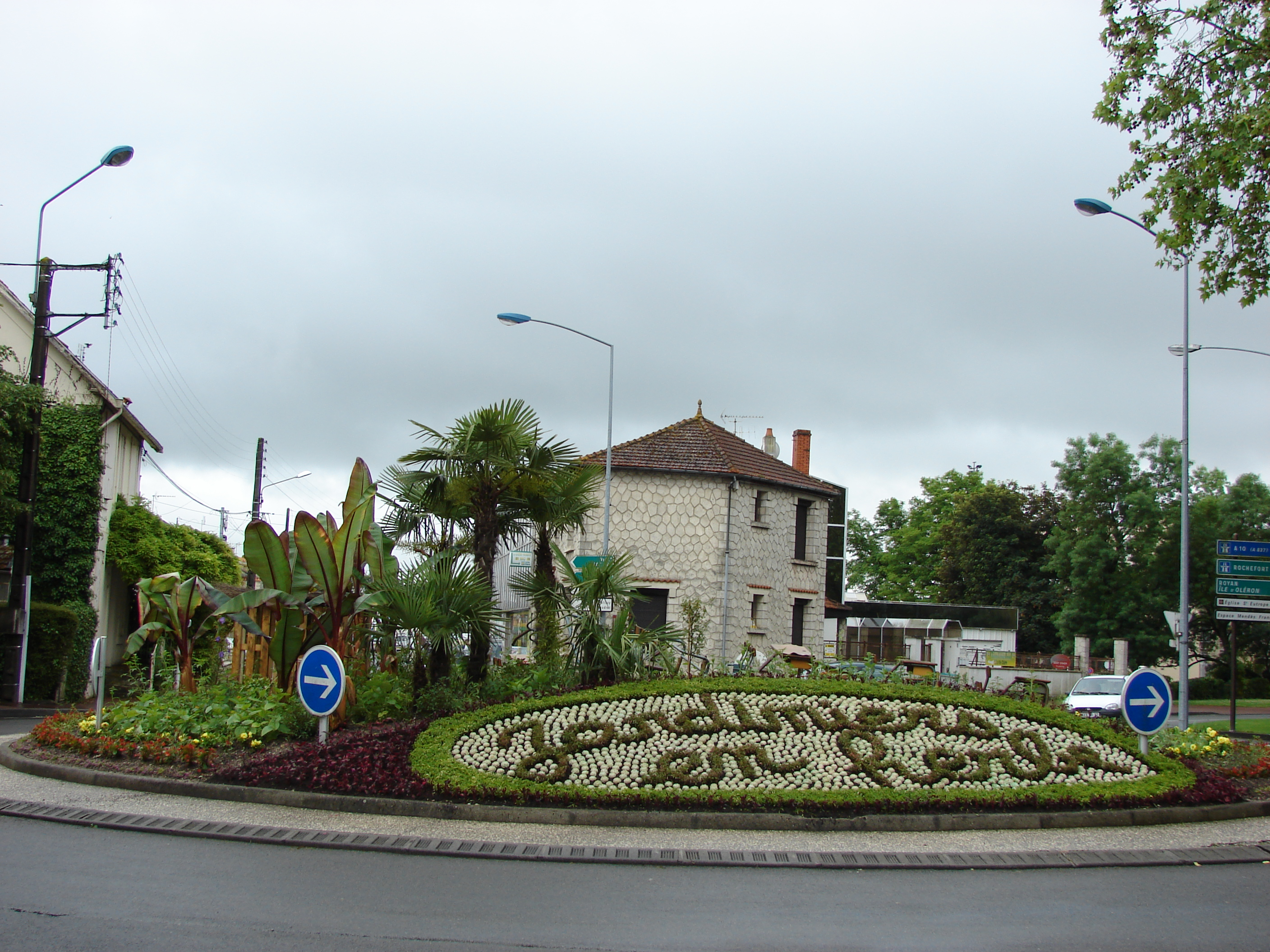 Saintes, Poitou-Charentes, France